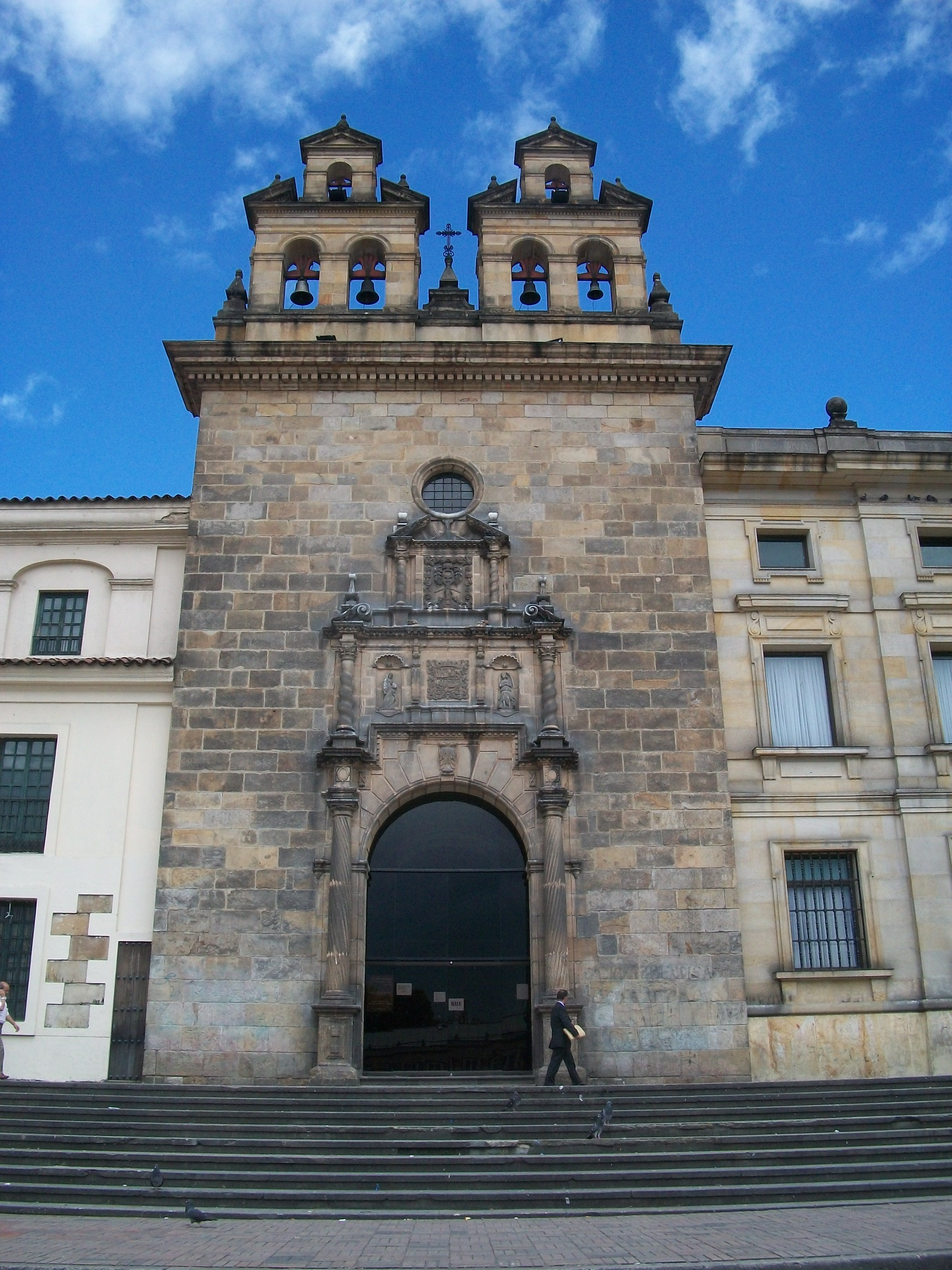 Capilla del Sagrario, Bogotá, costado oriental de la Plaza de Bolívar.